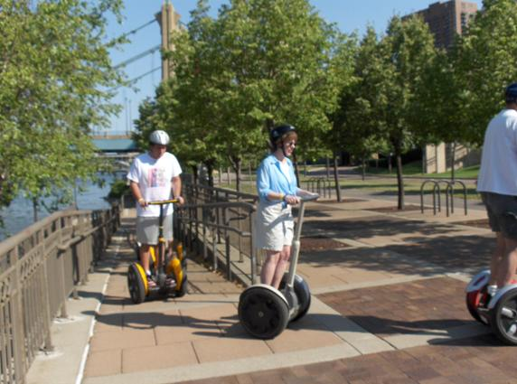 Dëst ass en Bild vun engem Segway deen ëch ënnerwee zu Minneapolis begéint hun.